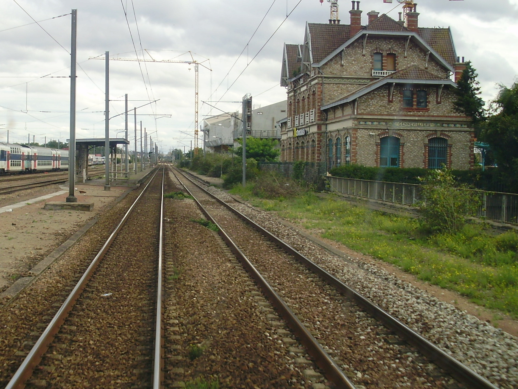 Ancienne gare de Gennevilliers, avenue Marcel-Paul (D 911), à Gennevilliers, Hauts-de-Seine, France : vue d'ensemble depuis la cabine de conduite d'une rame de la ligne C du RER entre la gare d'Épinay-sur-Seine et la gare (en service) de Gennevilliers, à l'arrière-plan (500 m après environ)